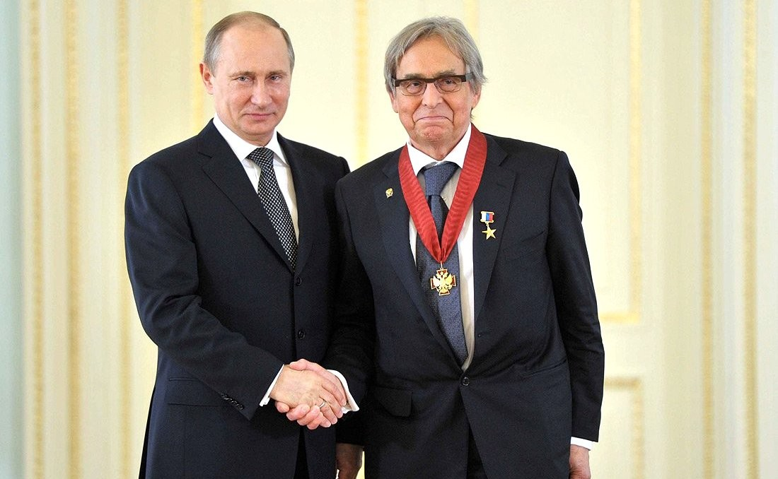 Звание Героя Труда присвоено академику РАН и РАМН, директору Института нейрохирургии имени Н.Н. Бурденко Александру Коновалову.